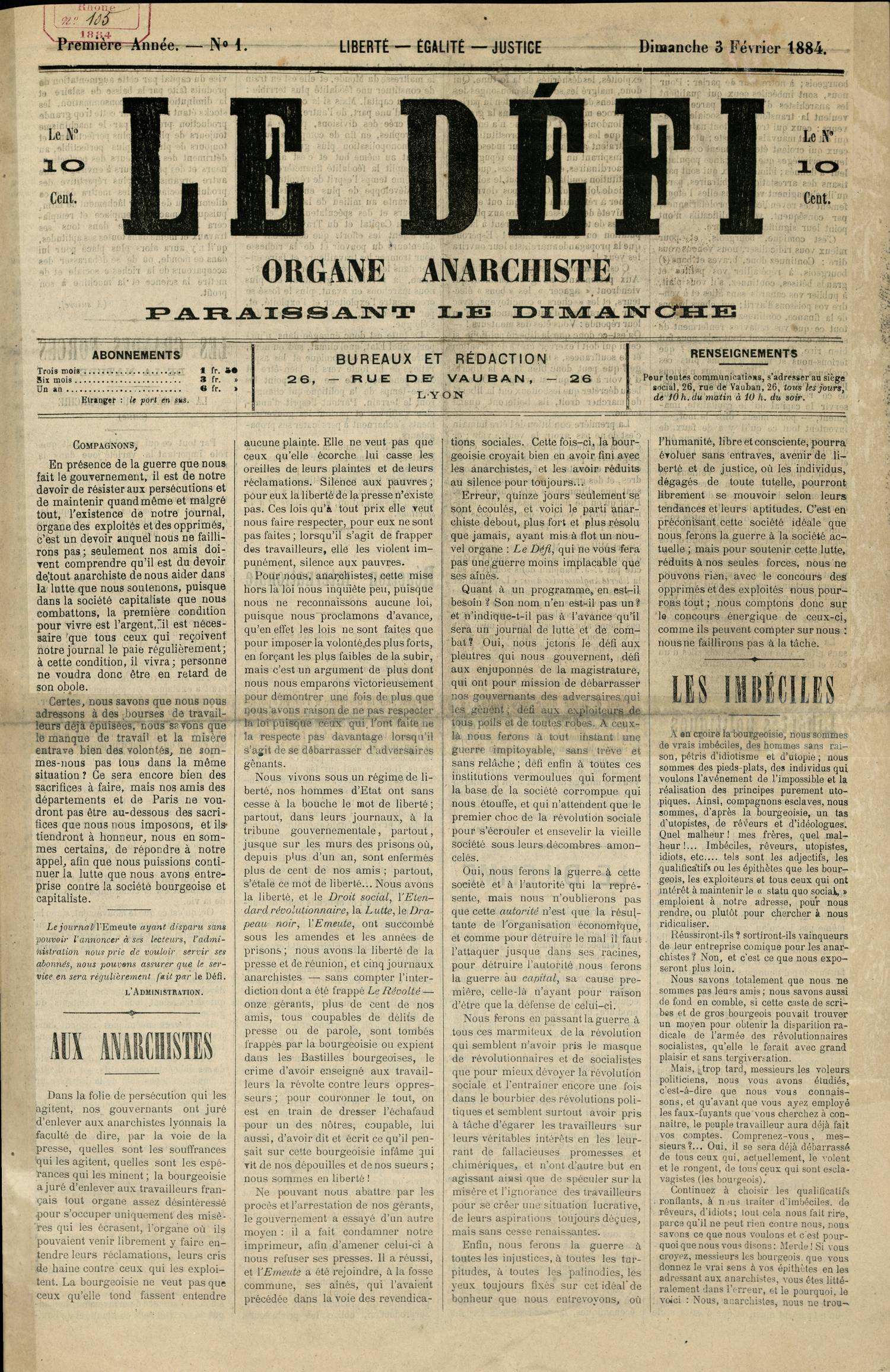 Le Défi, organe anarchiste : 3 numéros publiés en février 1884.